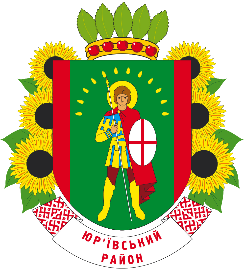 Герб Юр'ївського району